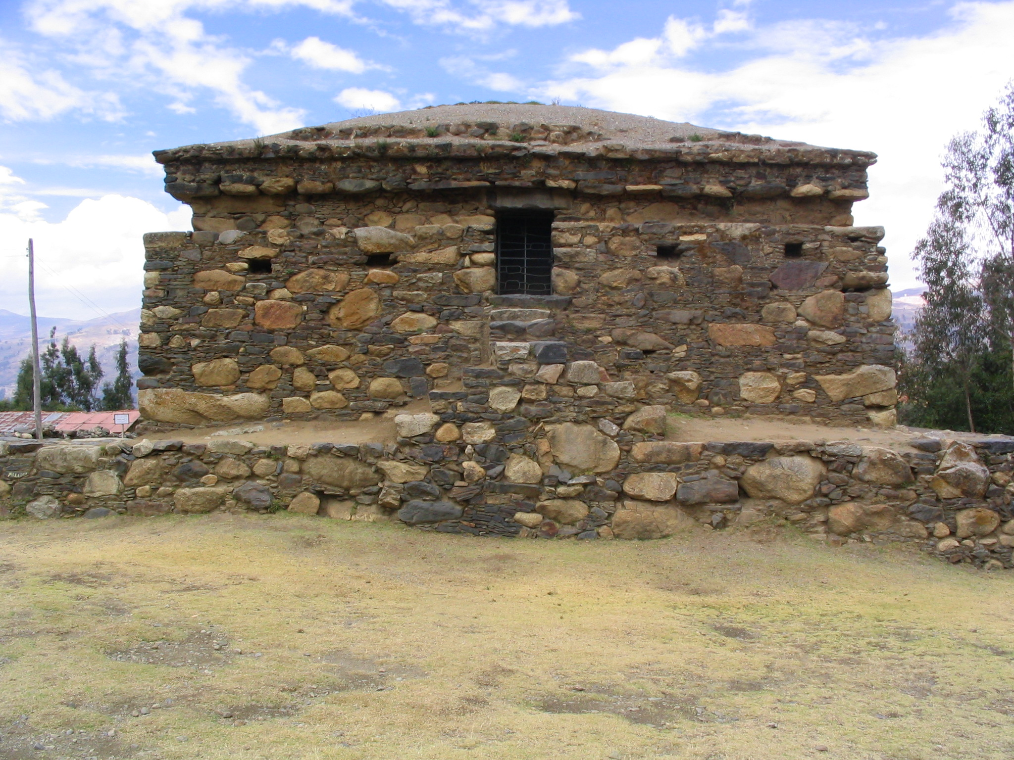 Willkawain Willkawain, Temple in Peru, Ancash